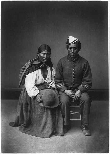 soldado peruano y rabona retratados cerca de la plaza de Acho antes de las batallas de San Juan y Miraflores